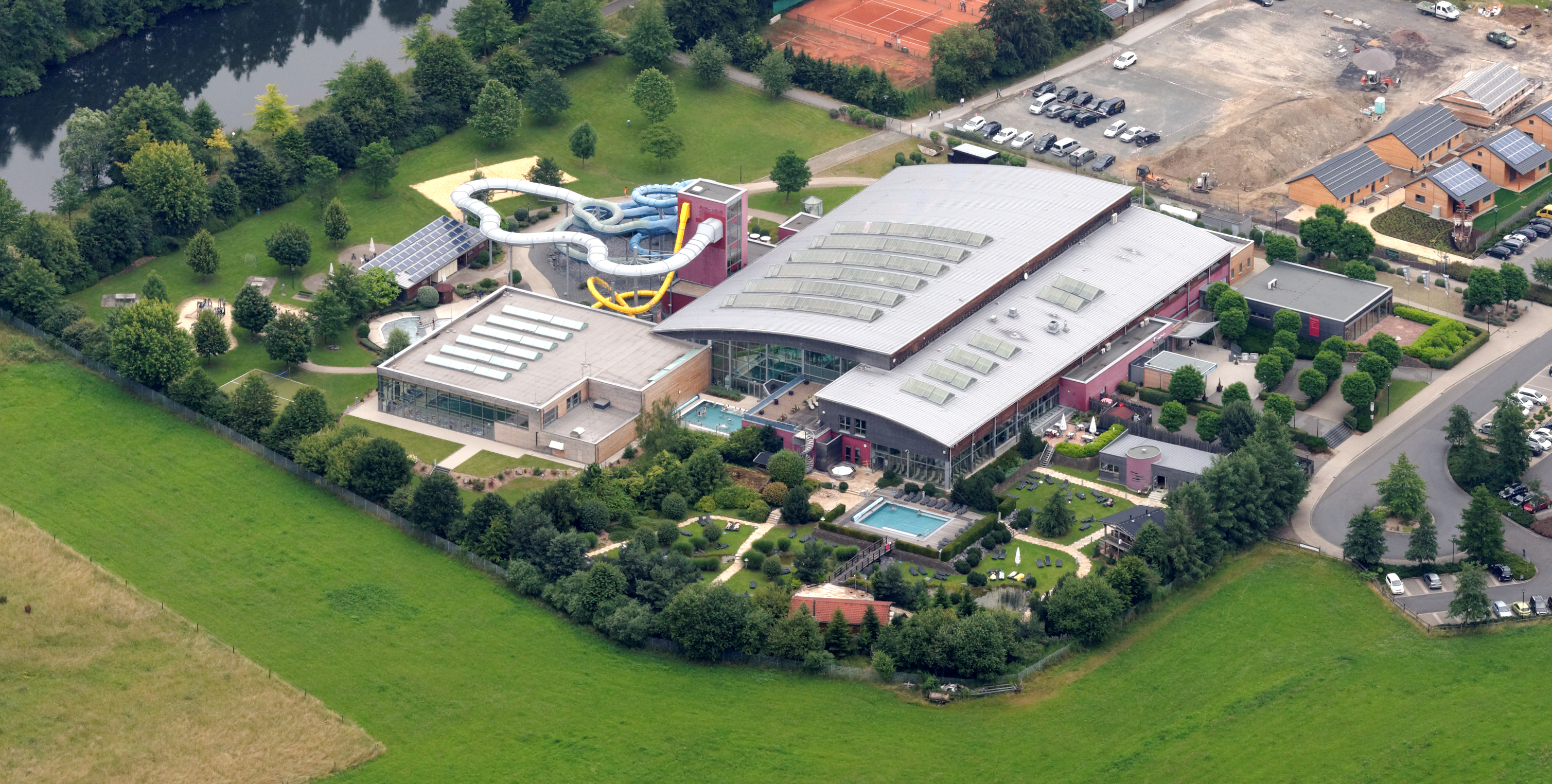 Fotoflug Sauerland Nord. Plettenberg, Freizeitbad Aqua Magis, Lenne, Ruhr-Sieg-Strecke, Bundesstraße 236, Blickrichtung Nordost The making of this document was supported by the Community-Budget of Wikimedia Germany.